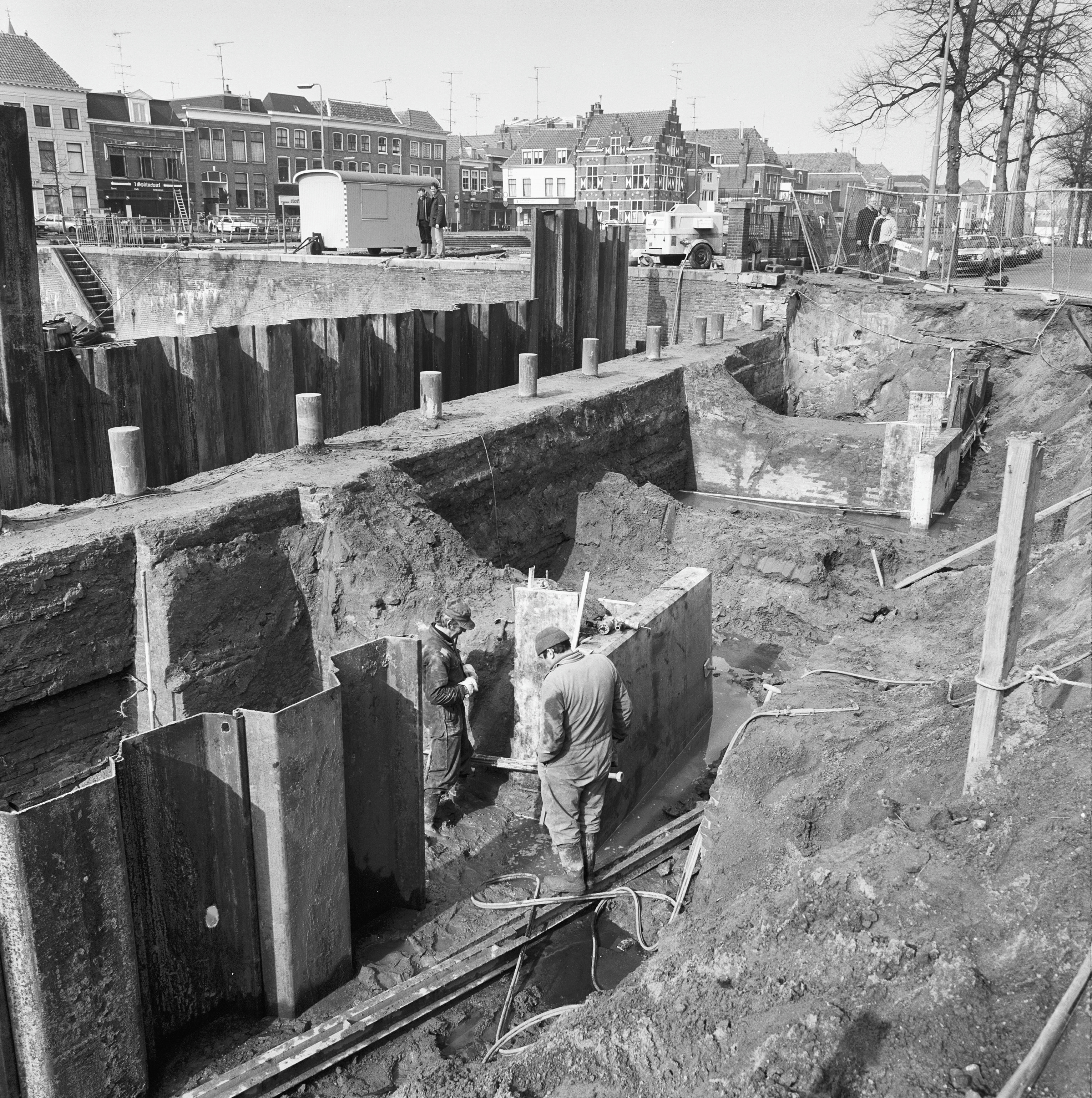 Exterieur AANGEBRACHTE SLUITINGSMUUR MET TWEE STEUNBEREN